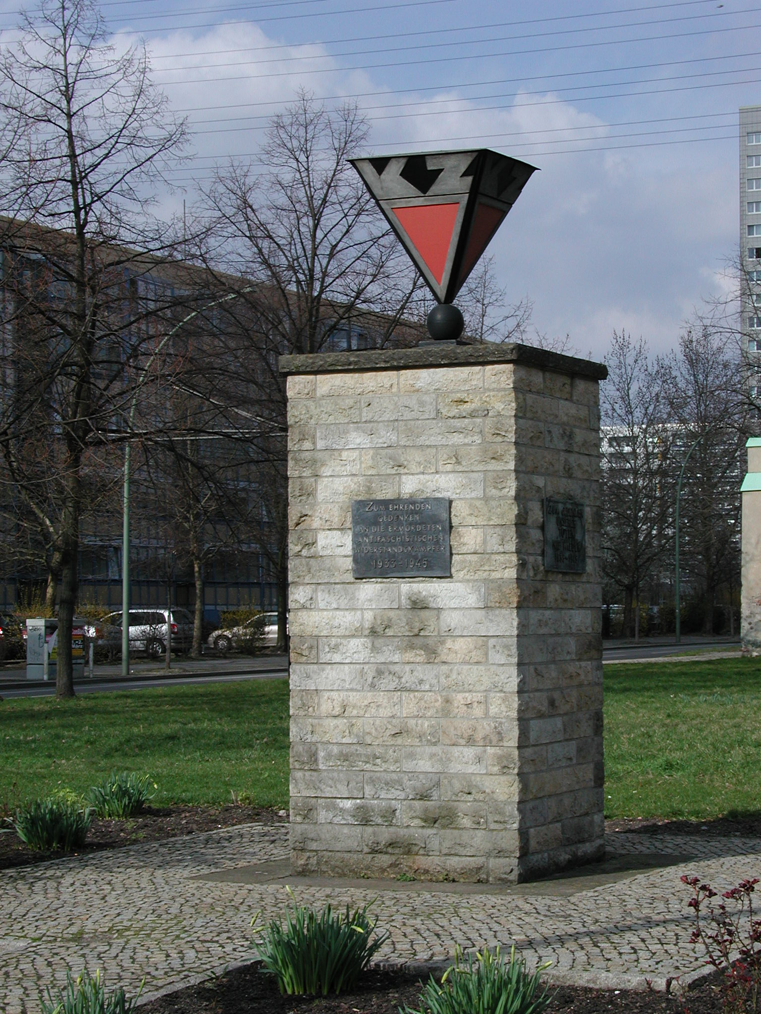 Loeperplatz, Denkmal für die Antifaschisten (1)